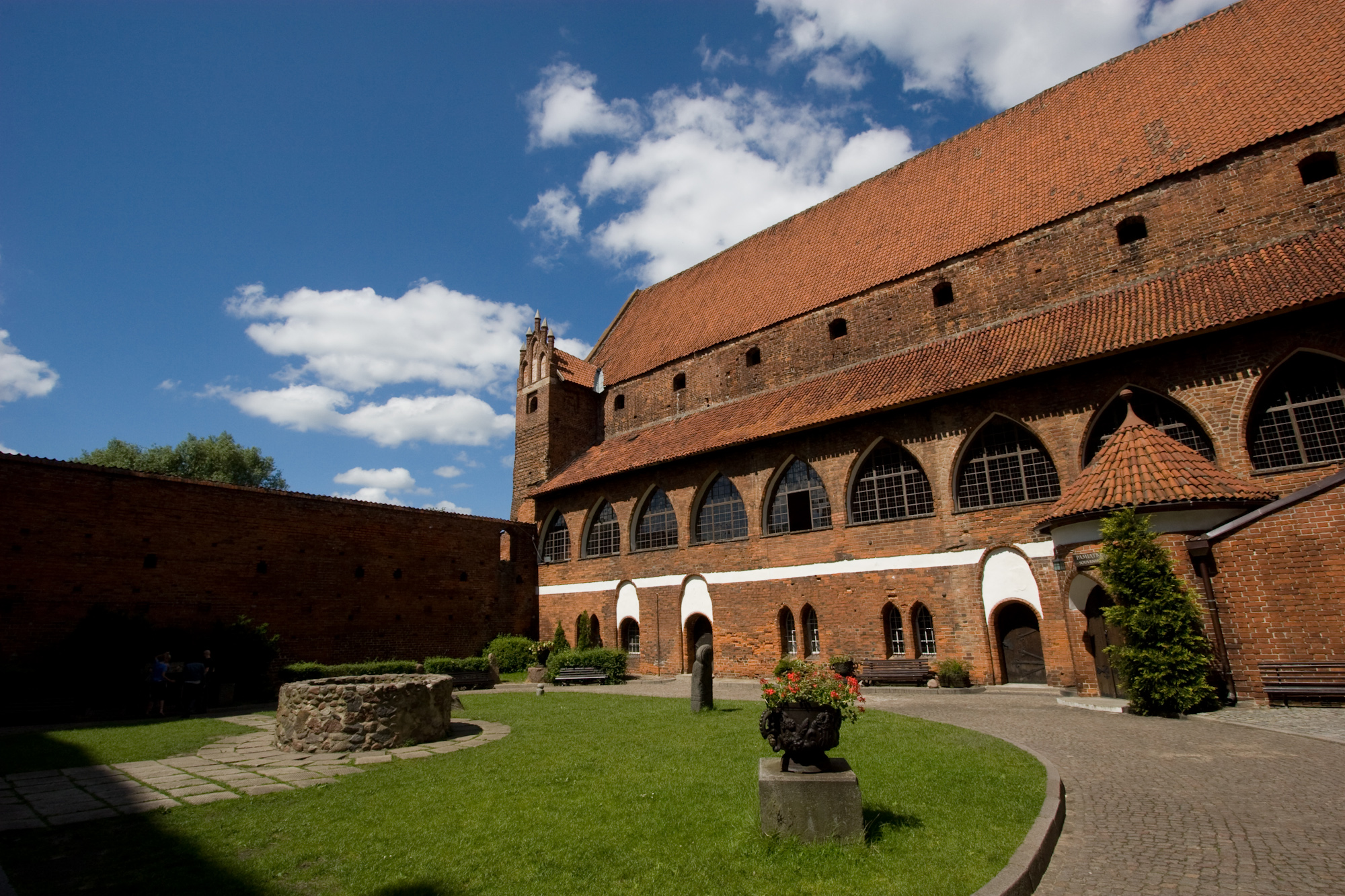 Północne skrzydło zamku w Olsztynie, widok z zamkowego dziedzińca